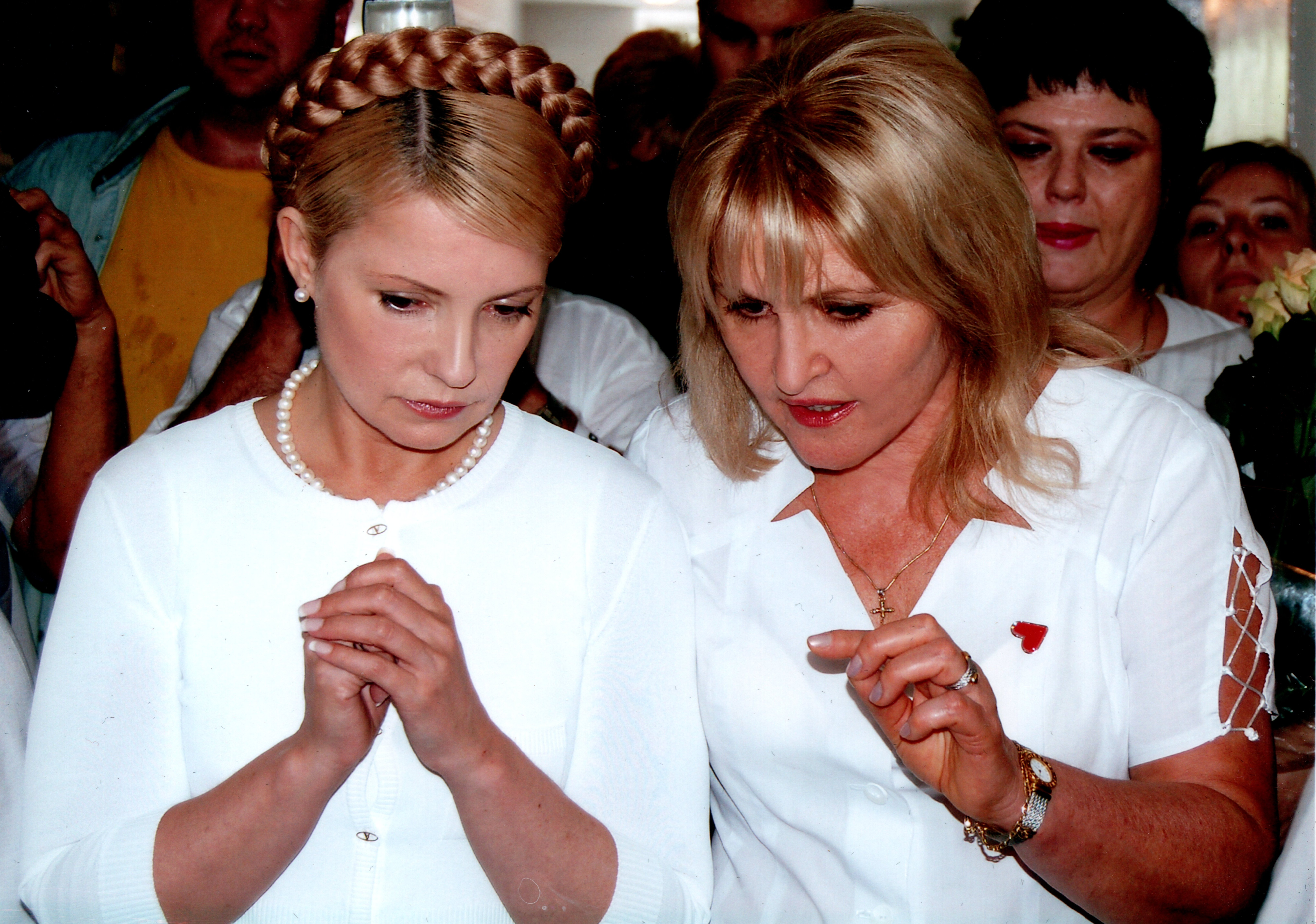 Зустріч Тимошенко Юлії Володимирівни з Падалко Людмилою Іванівною